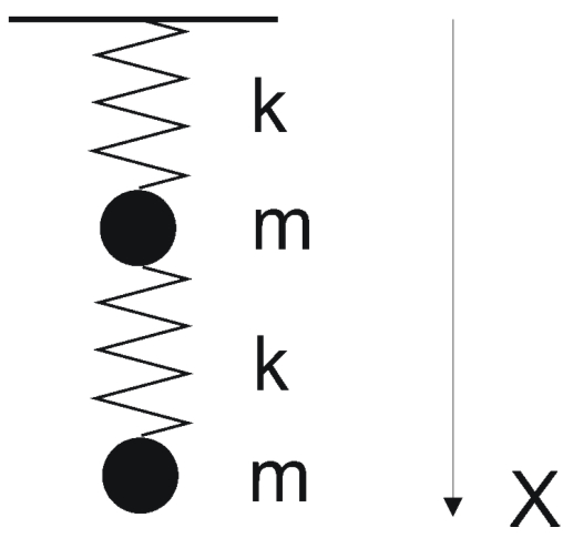 В этой задаче отношение амплитуд колебаний и частот пропорциональны числу Фидия.